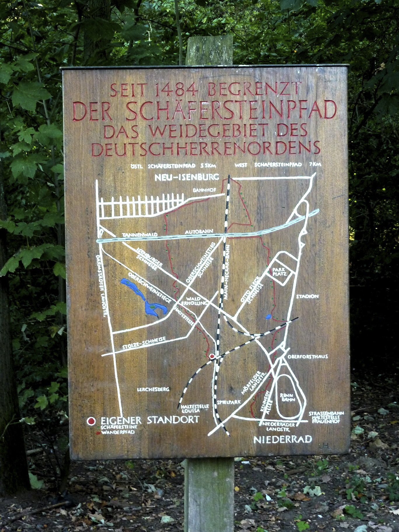 Der Schäfersteinpfad ist ein historischer Grenzweg aus dem 15. Jahrhundert in der Stadt Frankfurt am Main. Der Pfad markierte seit dem Jahr 1448 die Grenze zweier als Viehweide genutzer bewaldeter Gebiete (Hutewald) im Frankfurter Stadtwald – die der Stadt Frankfurt und die des in der Stadt ansässigen Zweiges des Deutschen Ordens. Das Foto zeigt eine Infotafel mit Lageplan des Wanderwegs. Dessen Verlauf ist auf dem Plan durch die dünne rote Linie markiert. Auf dem Plan liegt die Himmelsrichtung Norden unten.